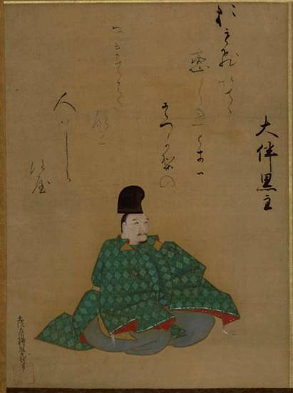 reprodukcja obrazu pt. Rokkasen-zu autorstwa Tosa Mitsuoki